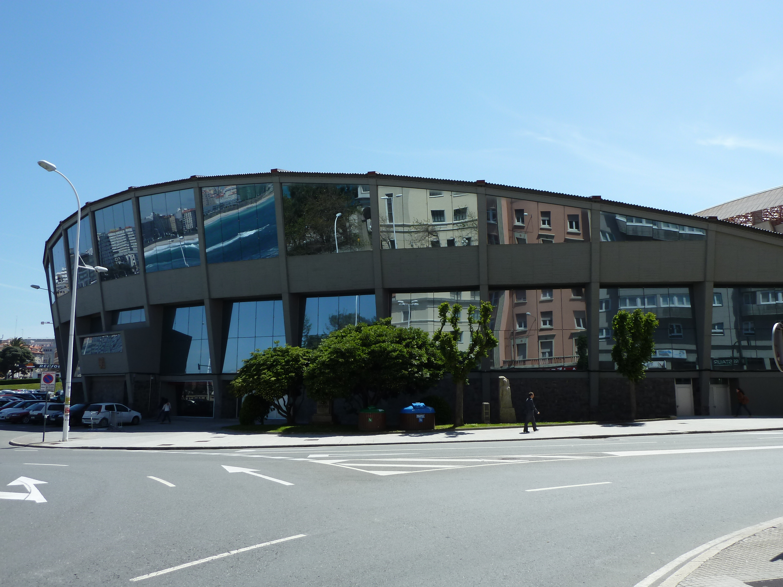 Pazo dos Deportes de Riazor na cidade da Coruña.